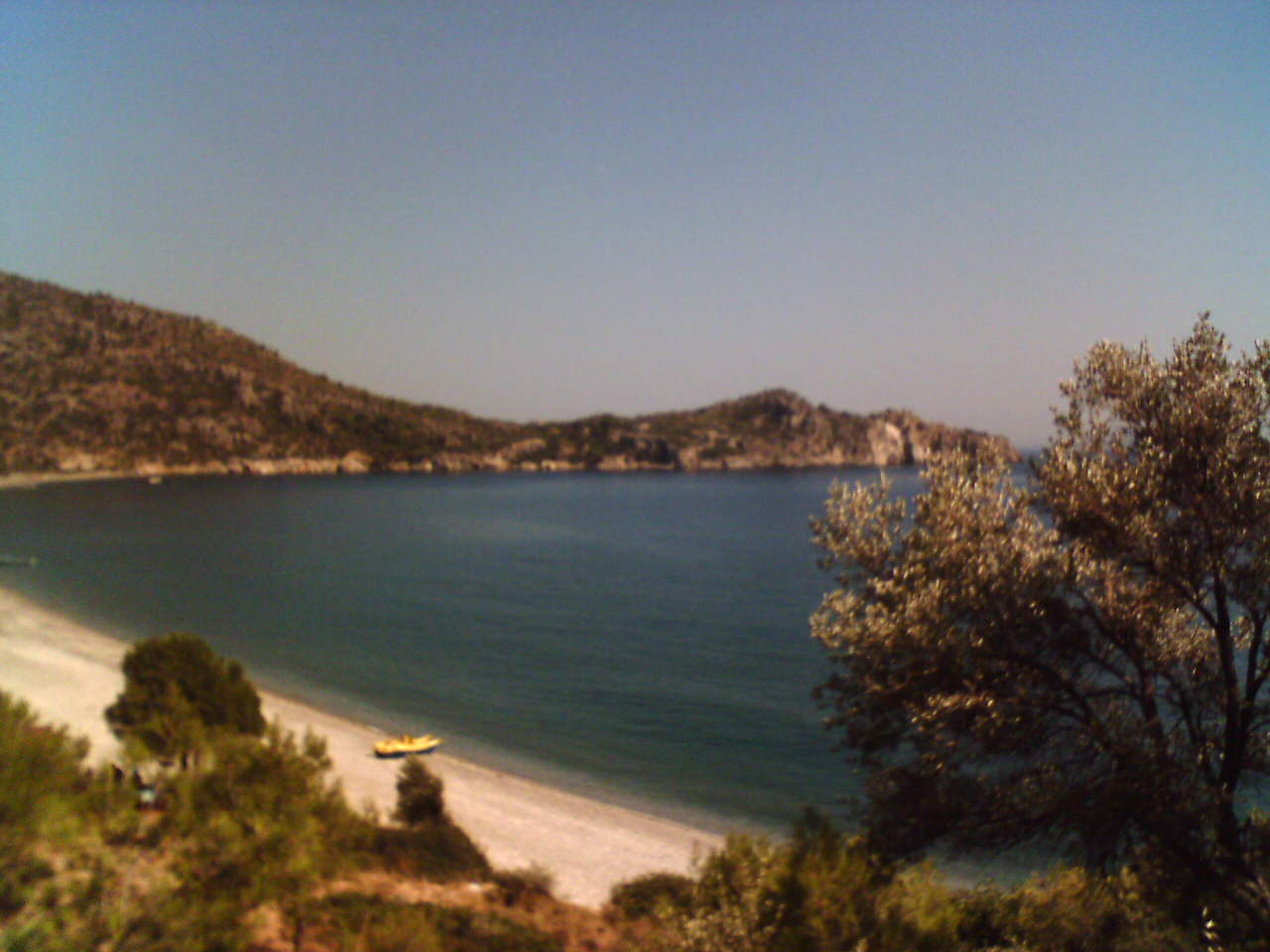 Dosya yükleyen kullanıcıya aittir. Resim Datça Yarımadası'nda çekilmiştir.